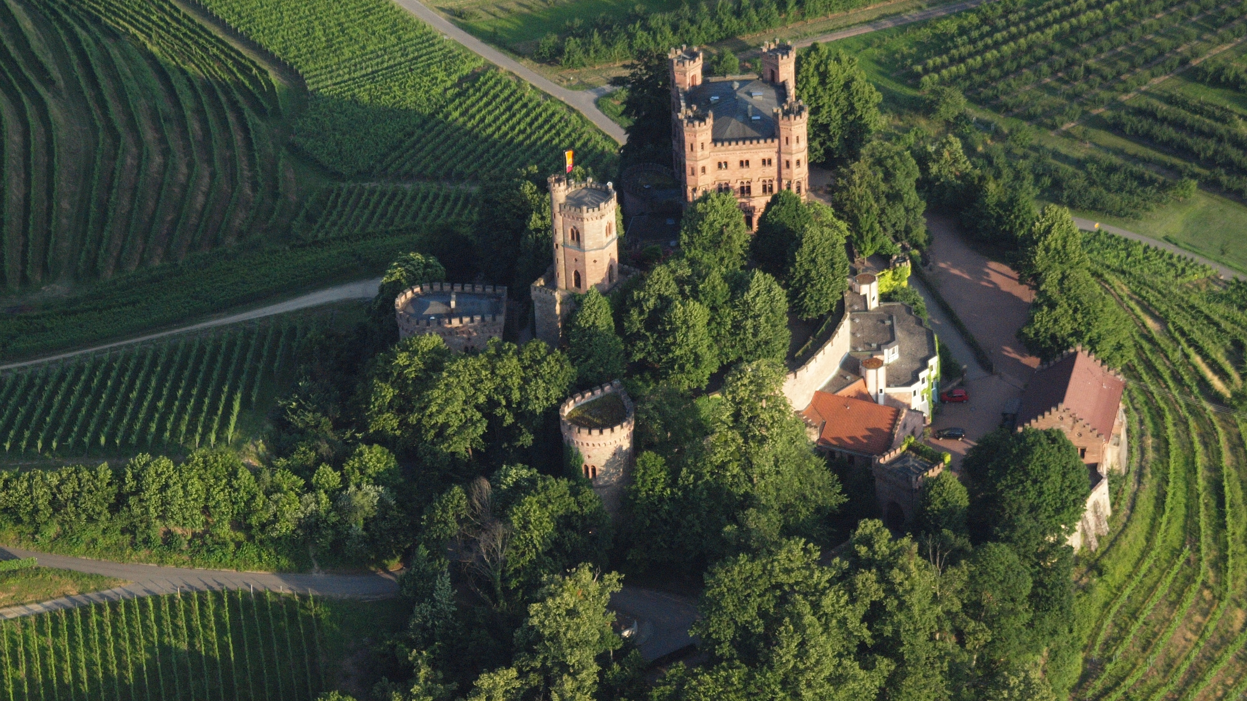 Schloss Ortenberg, Baden